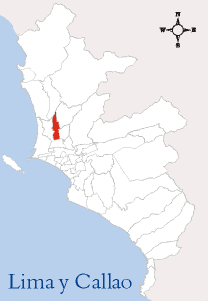 Localización del Distrito de Los Olivos Imagen elaborada por --Edgardo Reyes 21:24 9 mar, 2005 (CET) Categoría:Mapas del Perú (imagen)